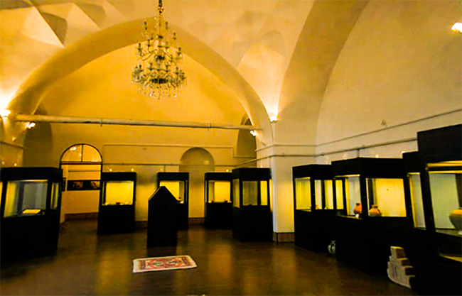 موزه مردم شناسی کازرون